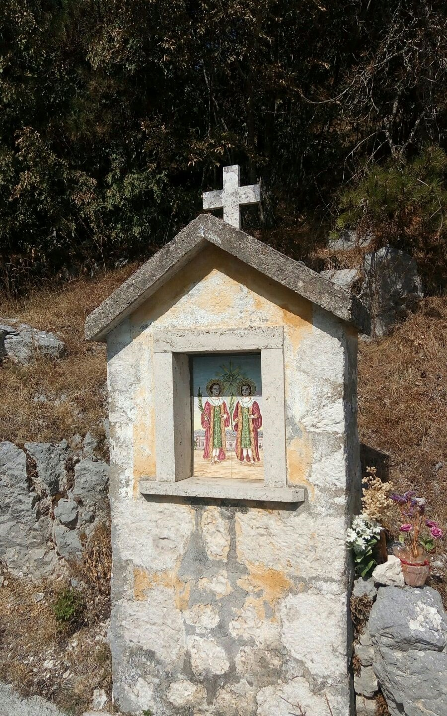 cappellina